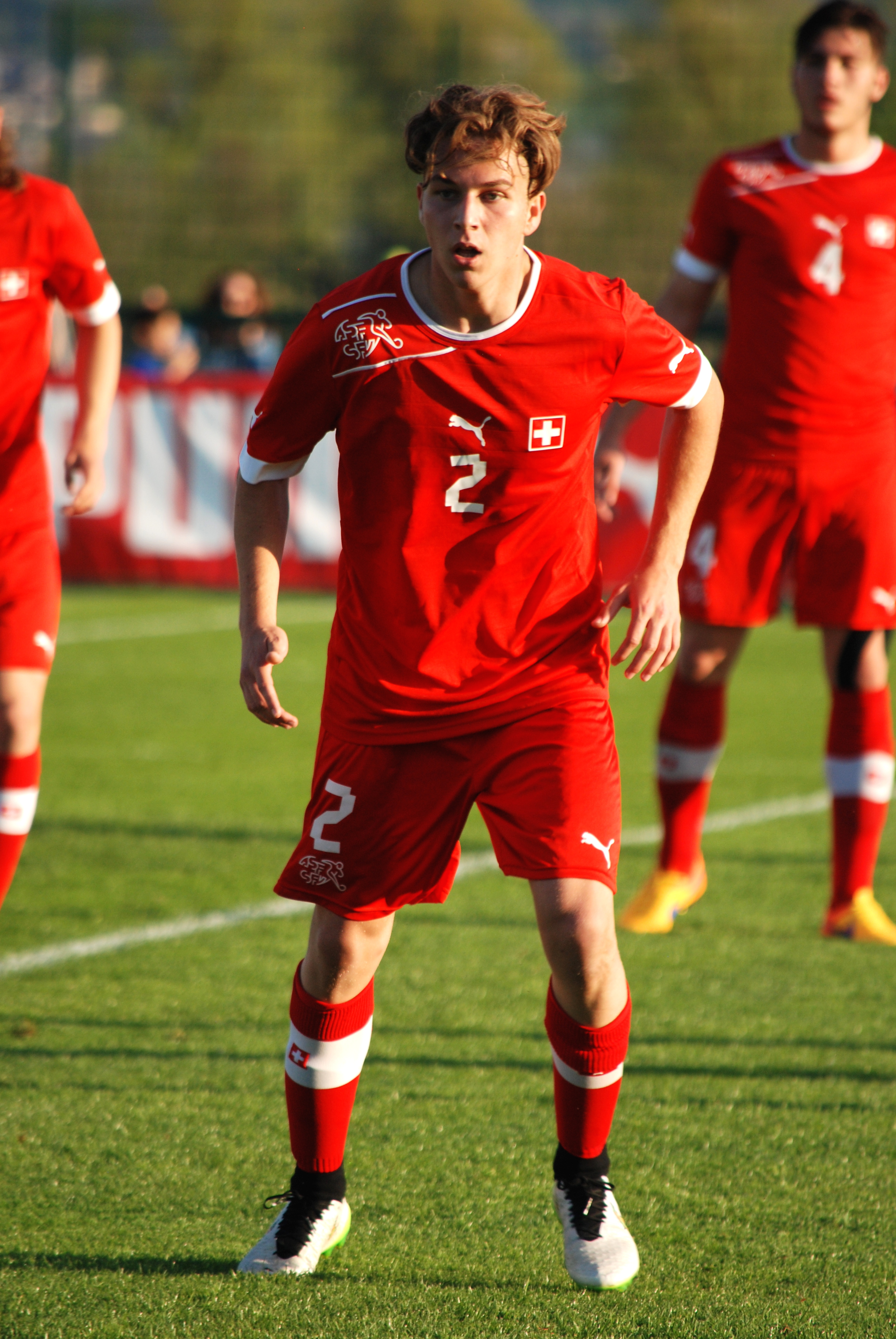 U18-Länderspiel der Schweiz gegen Serbien in Rapperswil